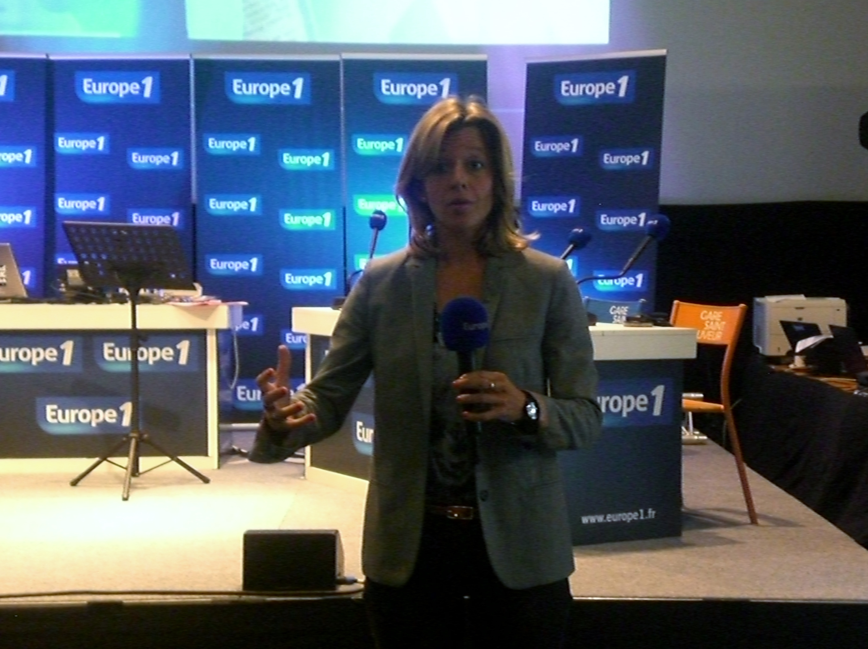 Wendy Bouchard, lors de la délocalisation de l'émission "Europe Midi" de la radio Europe 1, à Lille, le 5 septembre 2014.